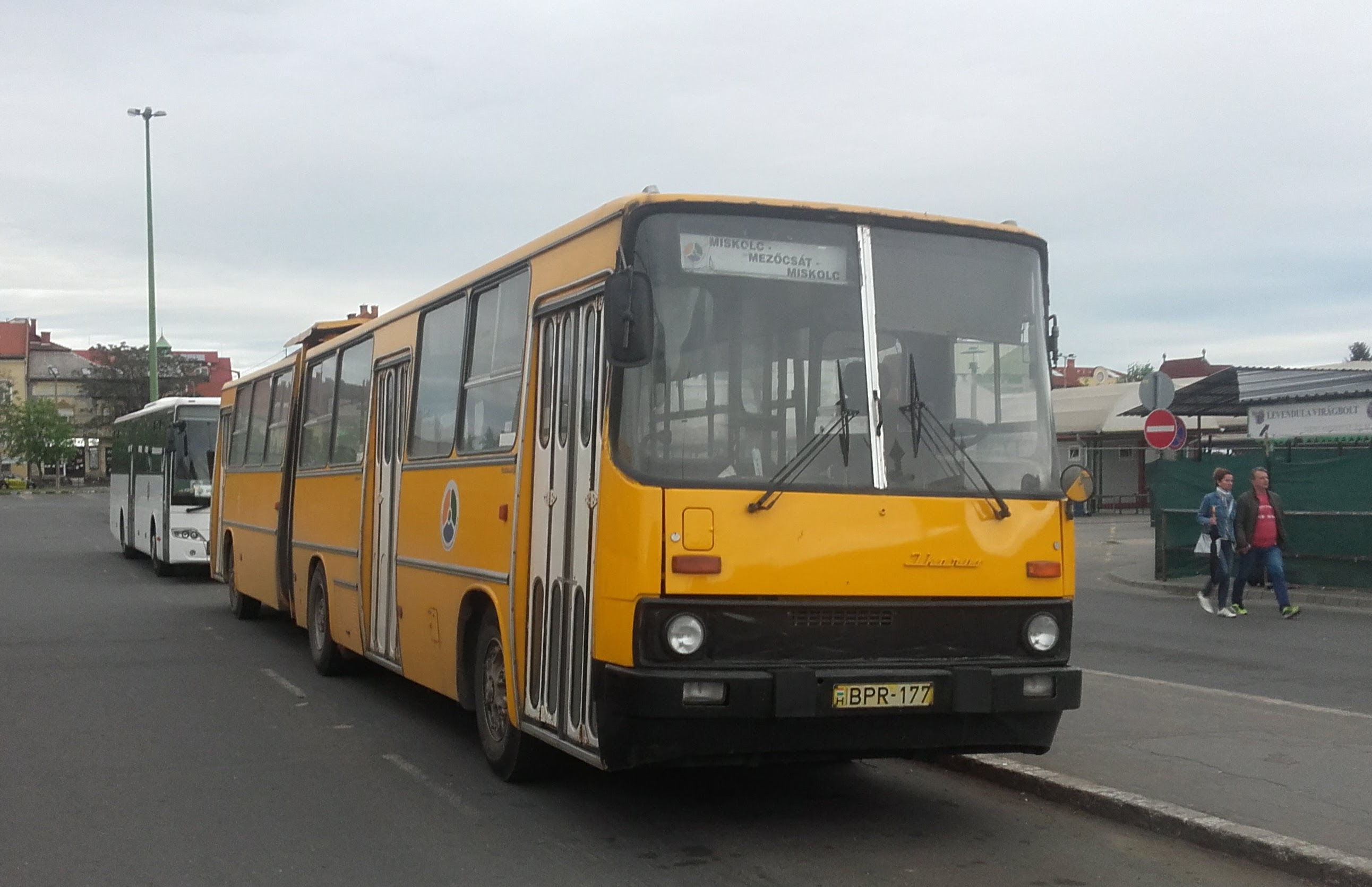 Az ÉMKK BPR-177 rendszámú Ikarus 280 típusú busza Miskolcon, a 3743-as helyközi járaton.